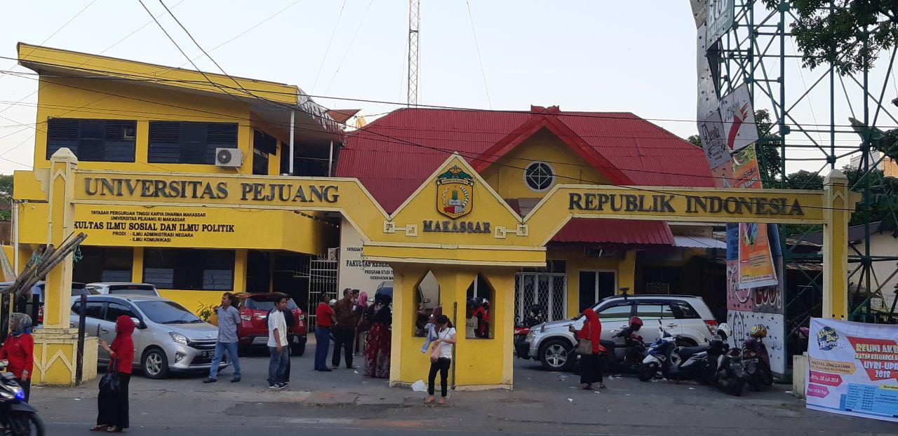 Kampus I - UPRI Makassar - Jl. G. Bawakaraeng No.72 Makassar